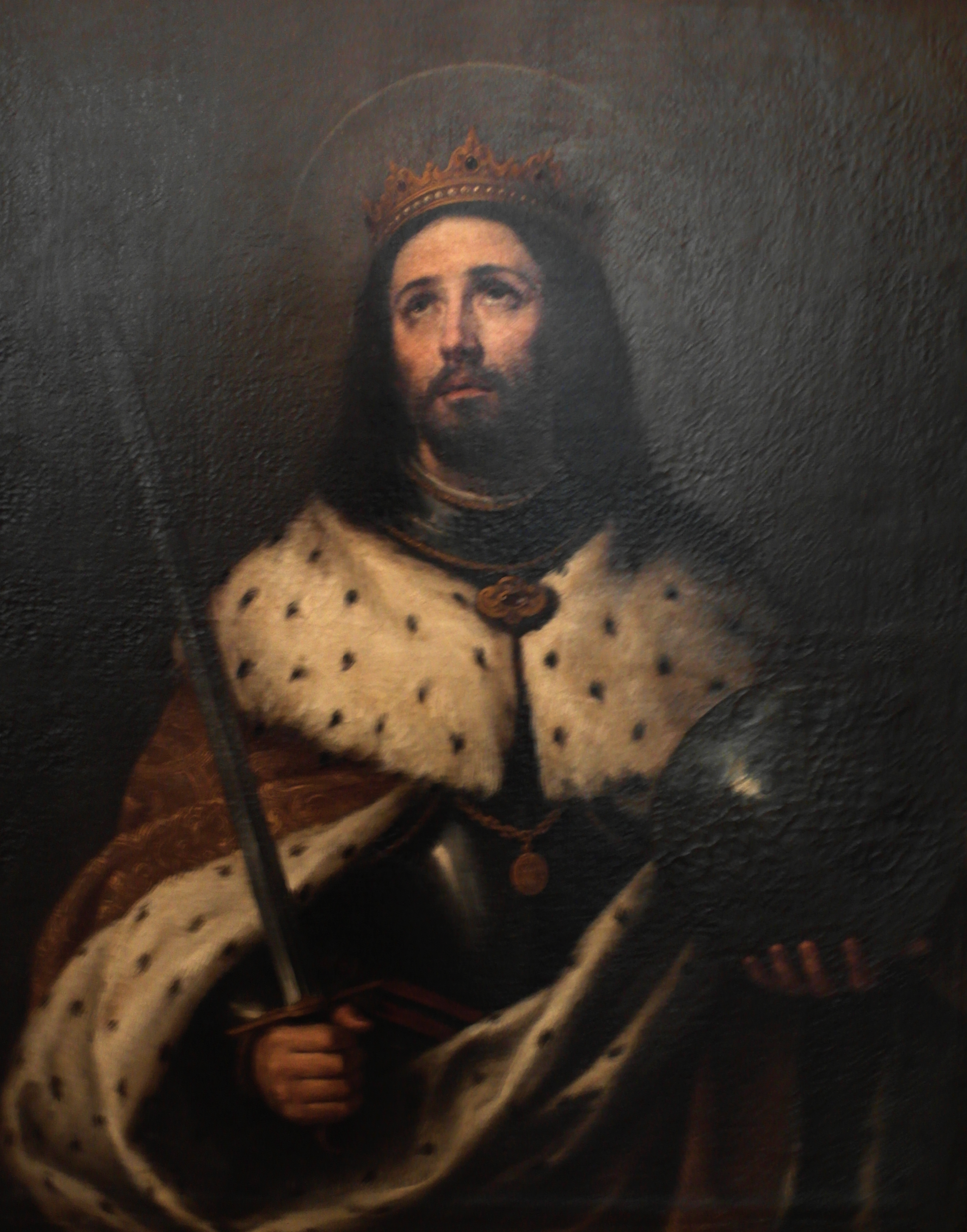 La obra representa al rey Fernando III de Castilla († 1252), apodado el Santo, que fue canonizado por el papa Clemente X en 1671, durante el reinado de Carlos II de España.